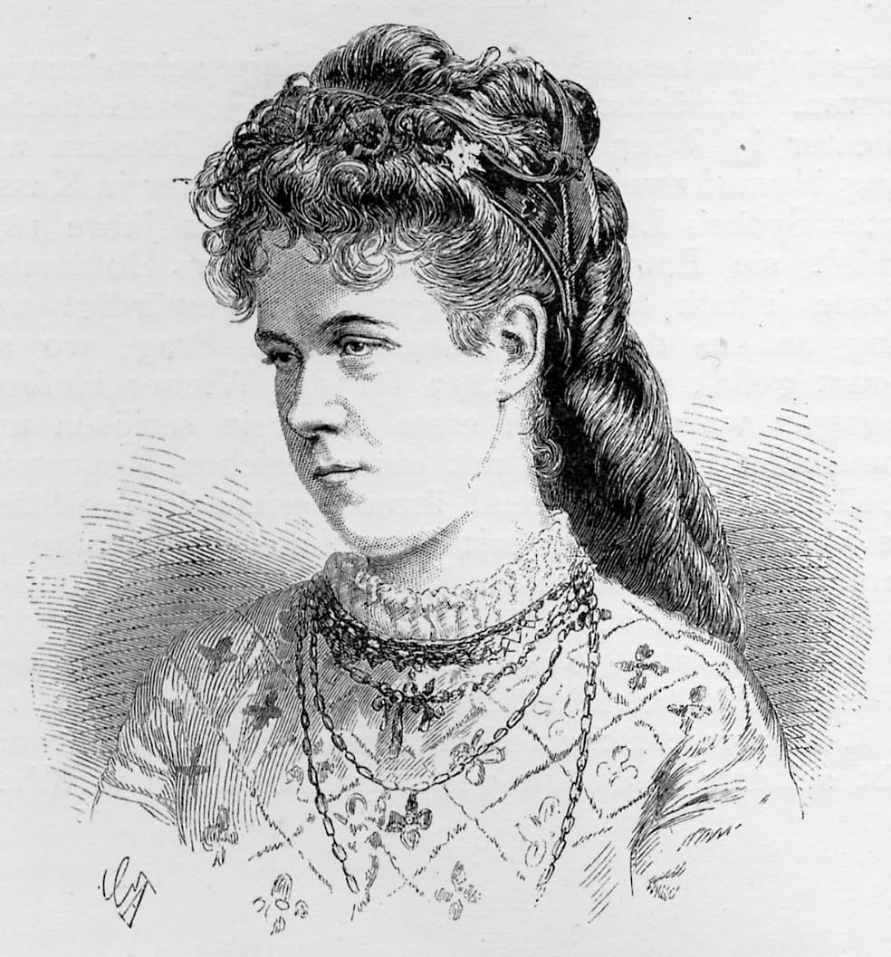 Bertha Ehnn-Sand